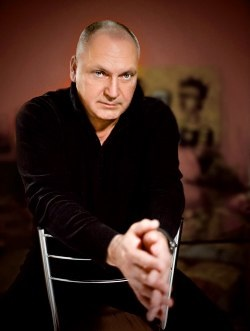 Фотопортрет Саши Варламова